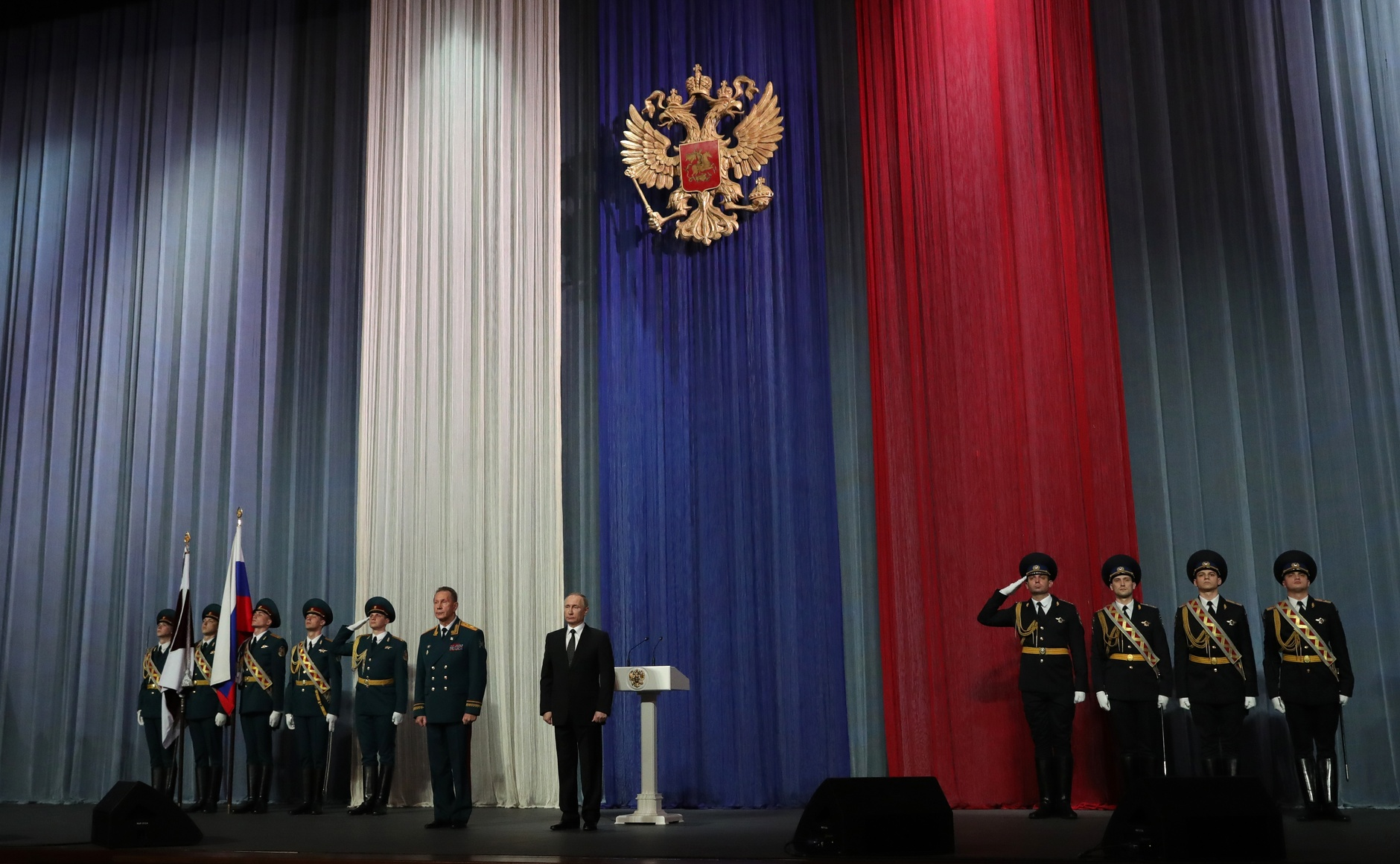 Торжественный вечер, посвящённый Дню войск национальной гвардии России